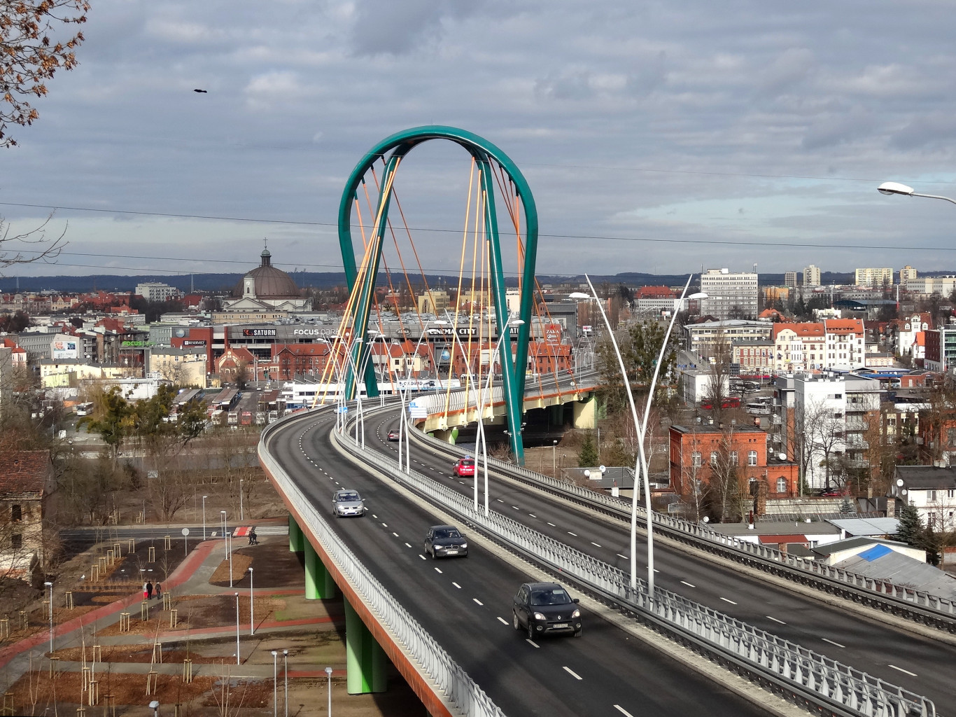 Trasa Uniwersytecka w Bydgoszczy